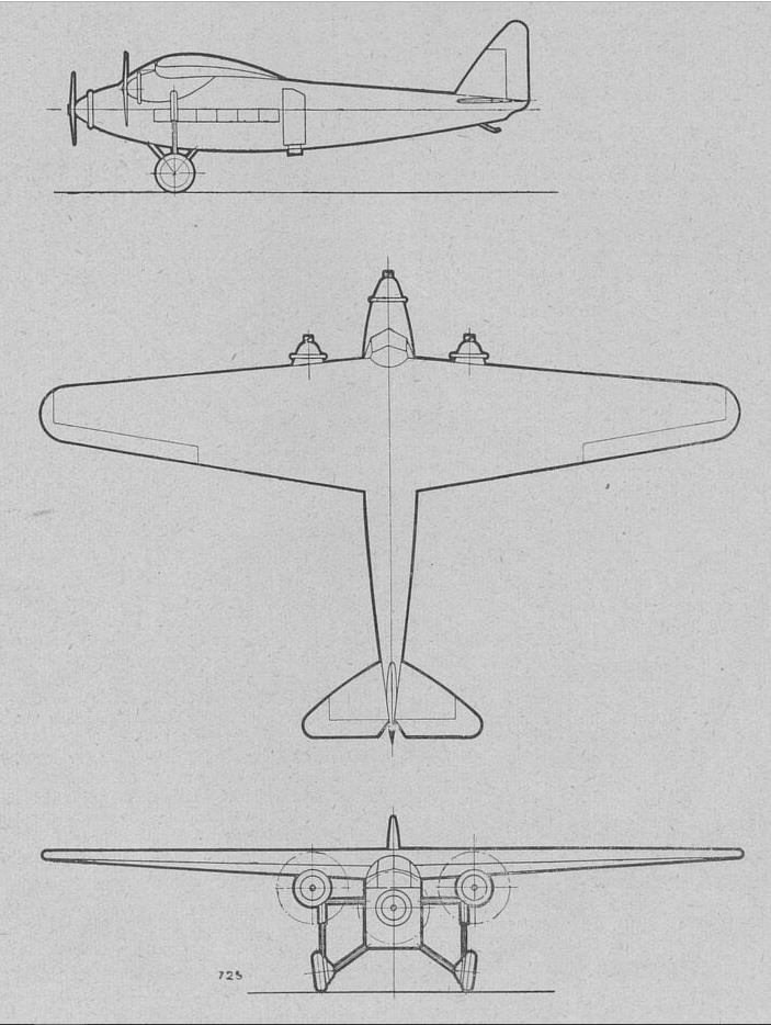 Savoia-Marchetti S.71, 3D-náhled